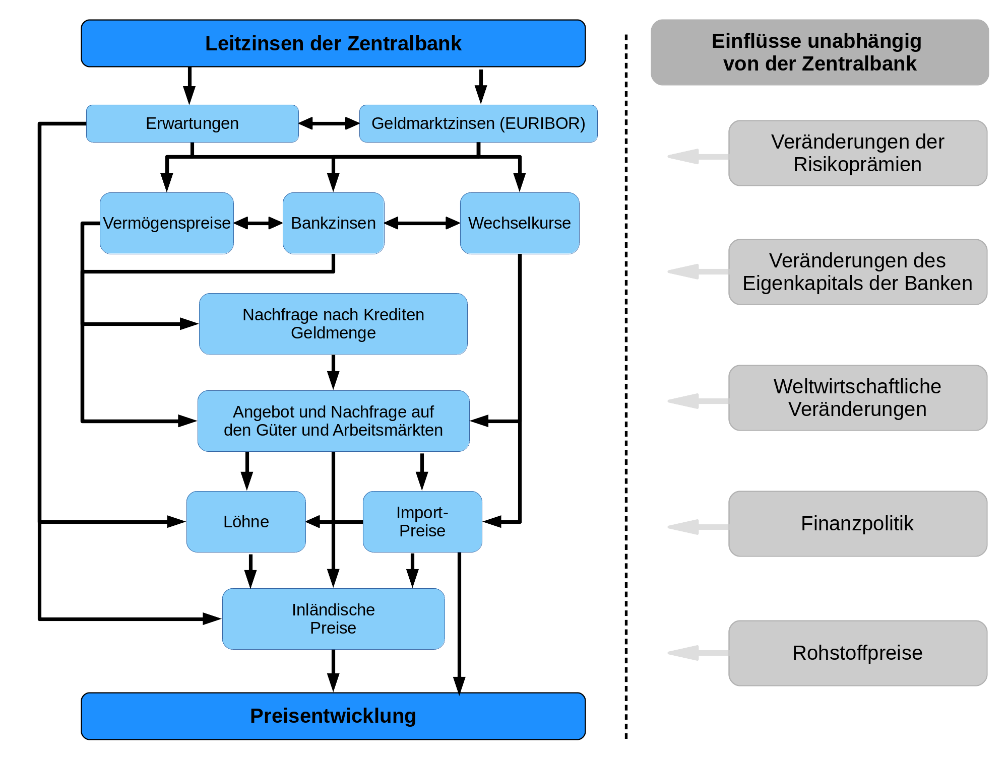 Vereinfachte Darstellung des geldpolitischen Transmissionsmechanismus von den durch die Zentralbank beeinflussten Leitzinsen zu den Preisen. Außerdem werden Angriffspunkte von externen Schocks angedeutet, die nicht im Einflussbereich der Zentralbank liegen.